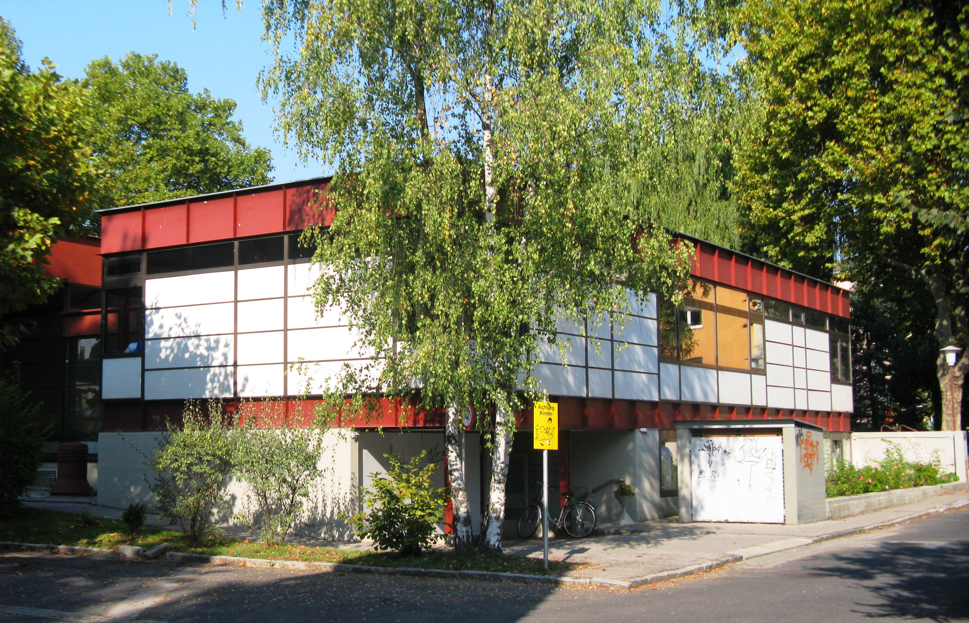 Kath. Pfarrkirche hl. Paulus, Pfarrzentrum St. Paul/Eisteich